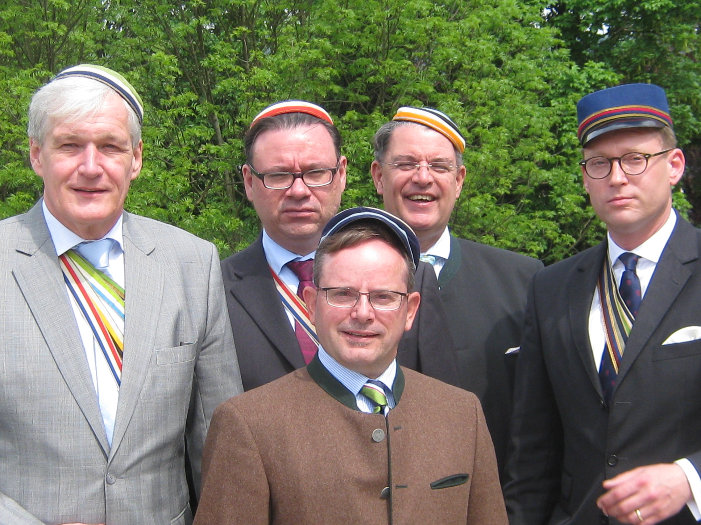 Vorstand des Verbandes Alter Corpsstudenten (2012–2015).